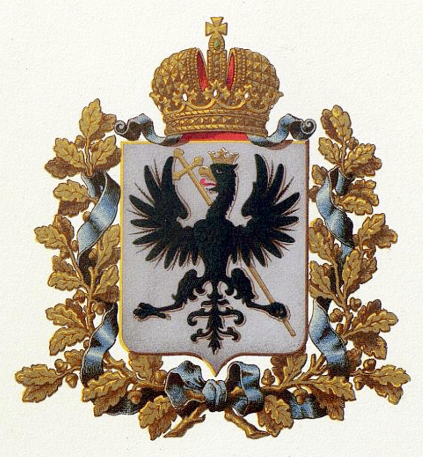 Official Russian Empire coat of arms Chernigov Governorate. Полугласный герб Российской Империи Черниговской губернии в Гербовнике Министерства внутренних дел Российской Империи. Утверждён Императором Всероссийским Александром Вторым в 1856 году.